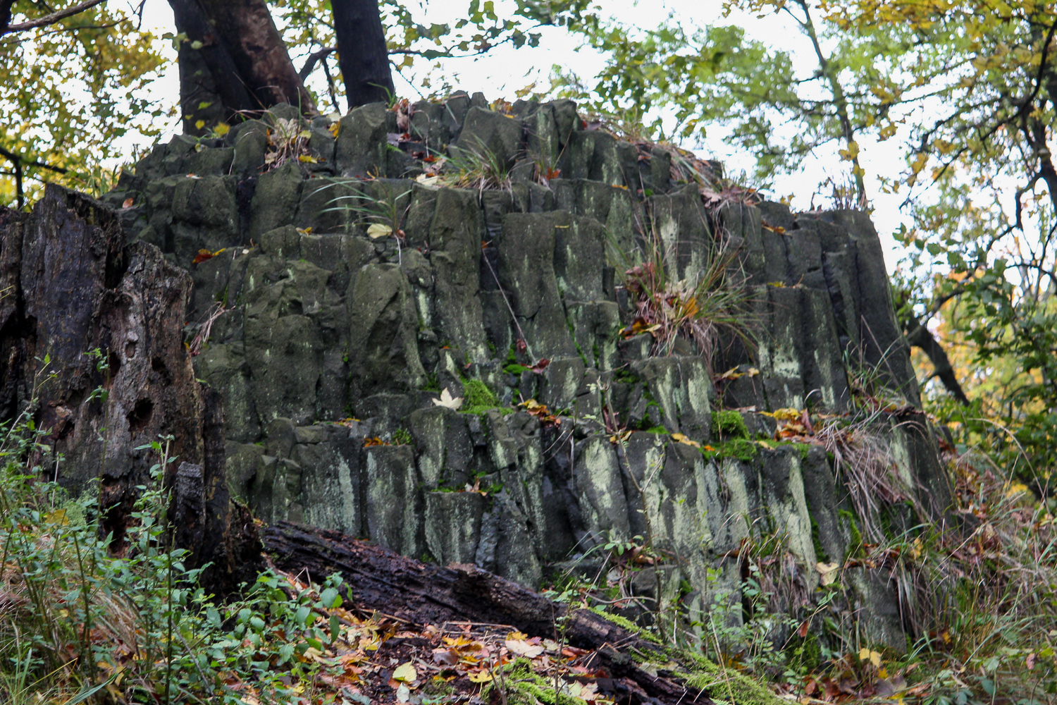 Sloupcovitá odlučnost čediče na Růžovském vrchu.